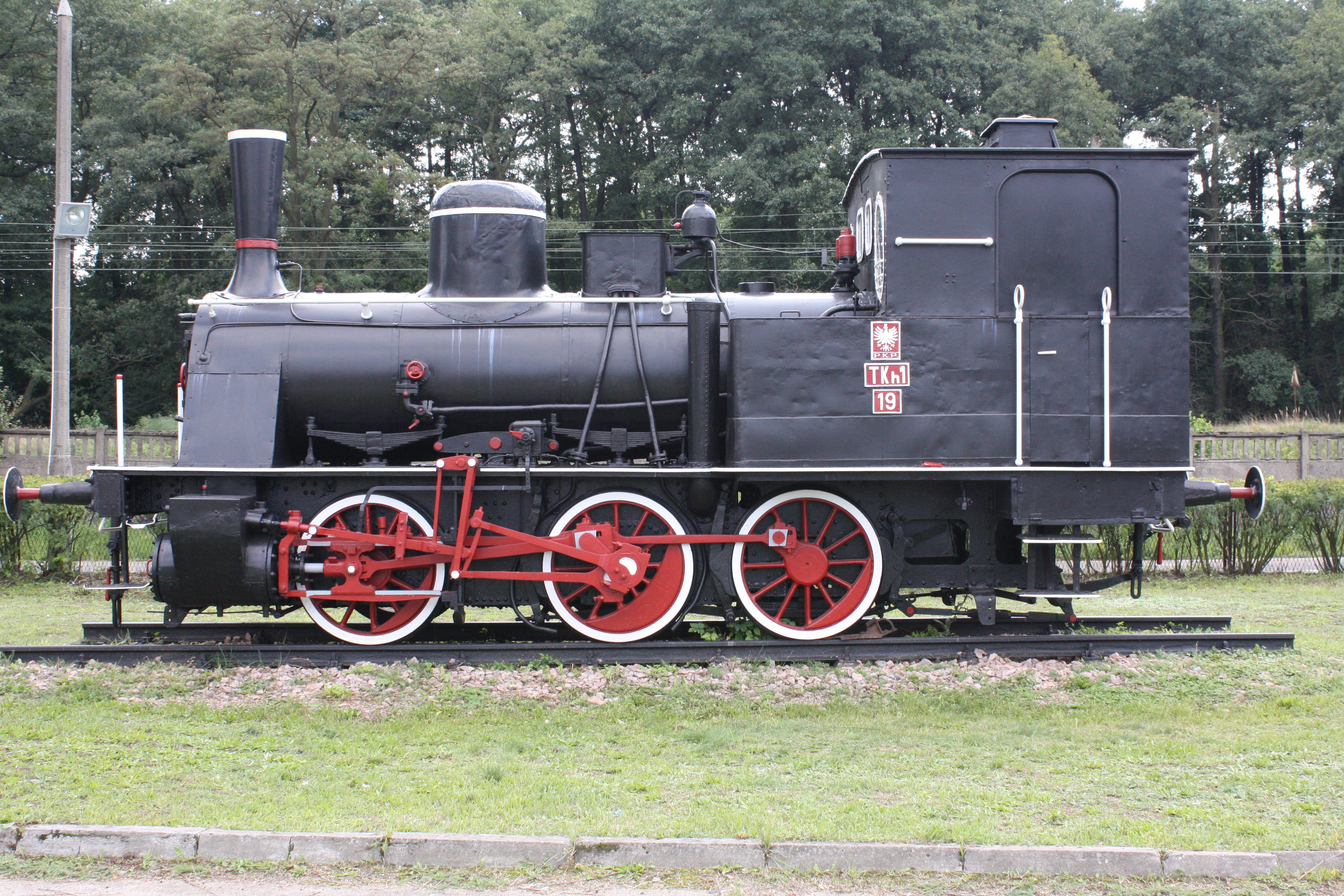 Lokomotywa TKh1-19 jako eksponat w Toruniu Kluczyki (numer fikcyjny, lokomotywa ta o numerze fabr. 1444 służyła wyłącznie na kolejach przemysłowych, aczkolwiek należy do pruskiej serii T3 i odpowiada serii PKP TKh1)